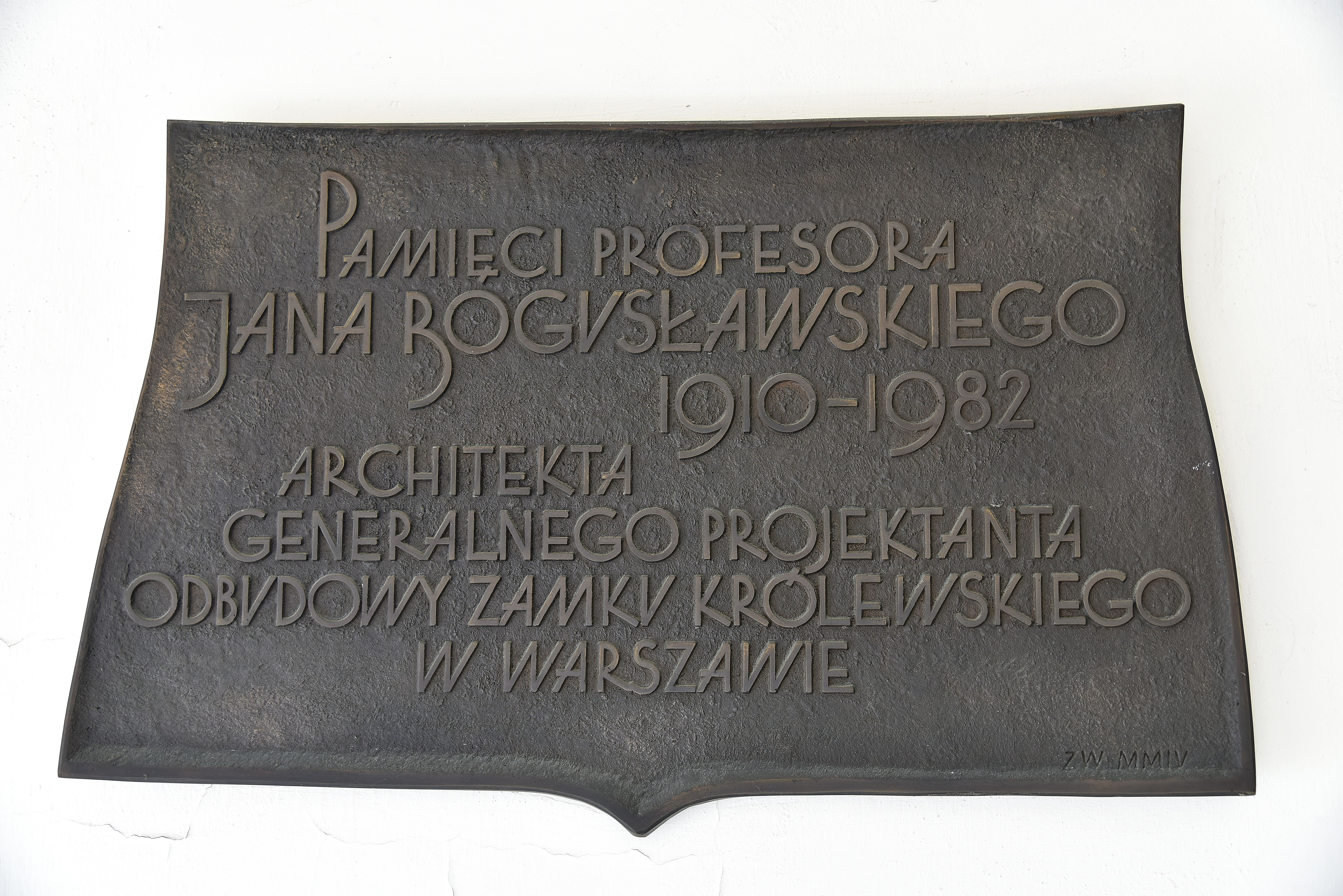 Tablica upamiętniająca Jana Bogusławskiego w Bramie Senatorskiej Zamku Królewskiego w Warszawie